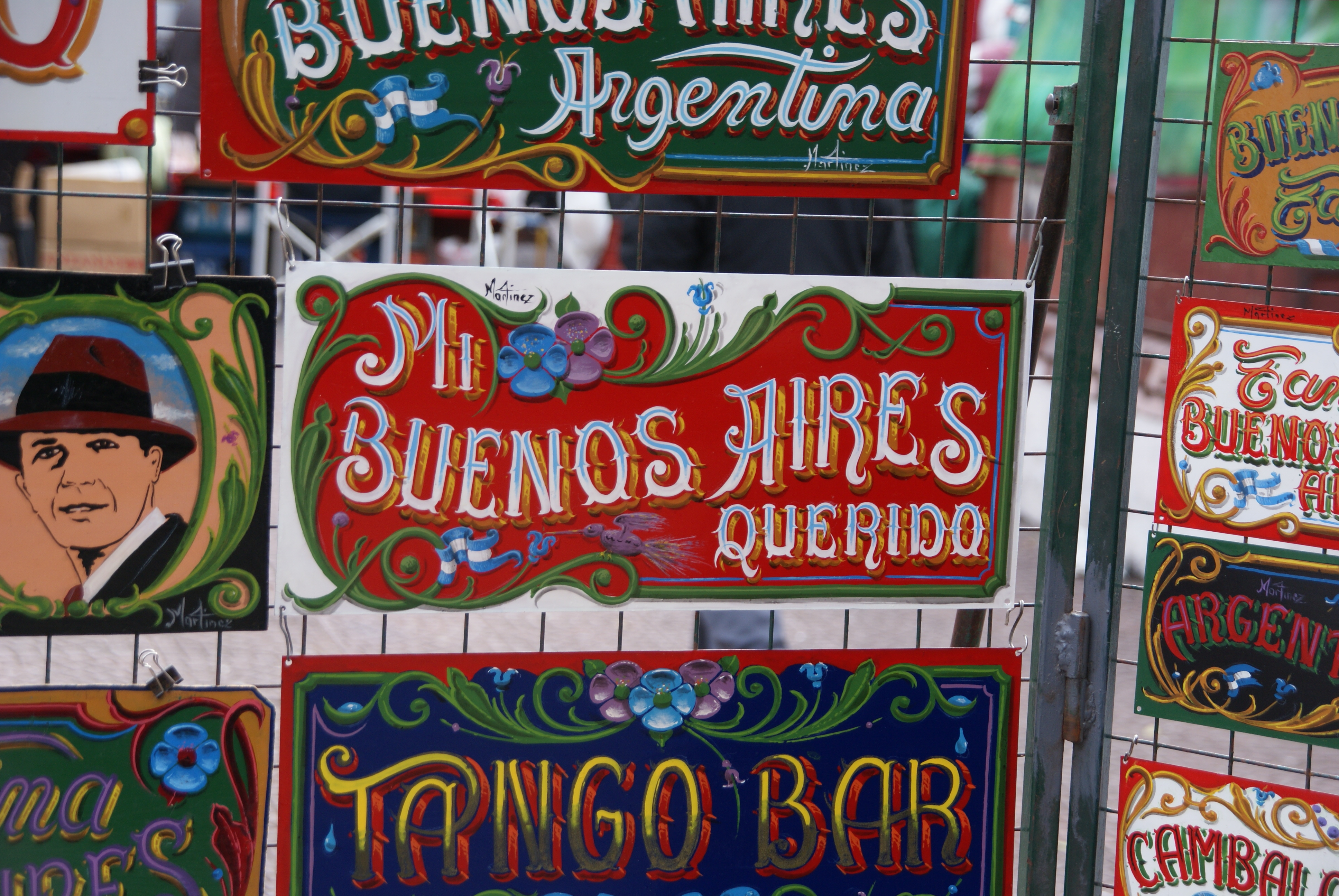 Buenos Aires, Argentina